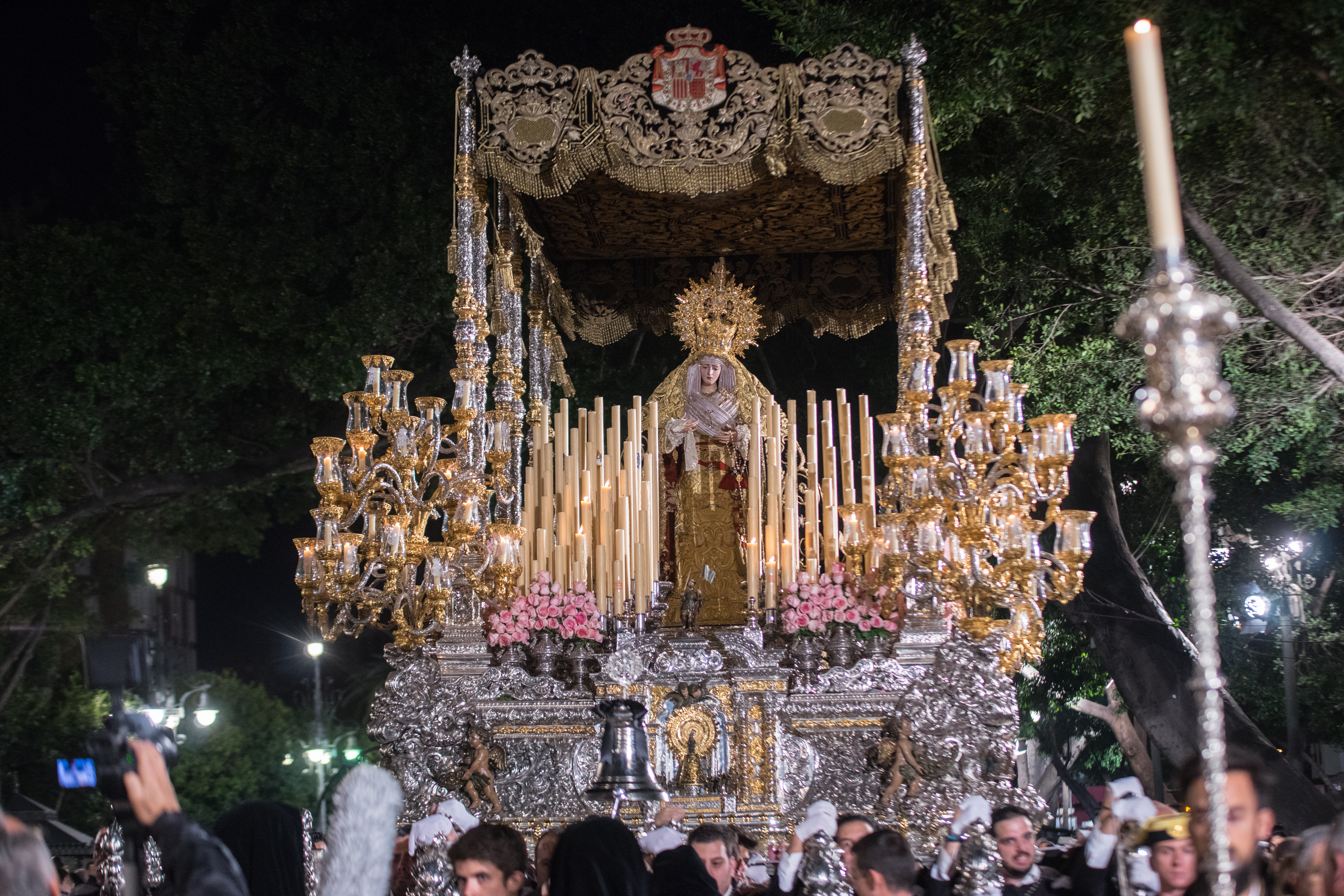 Pontificia, Real, Ilustre y Venerable Archicofradía Sacramental de Culto y Procesión del Santísimo Cristo de la Expiración y María Santísima de los Dolores Coronada This is a photography of a Folklore festival in Spain (Wikidata id Q9075883).